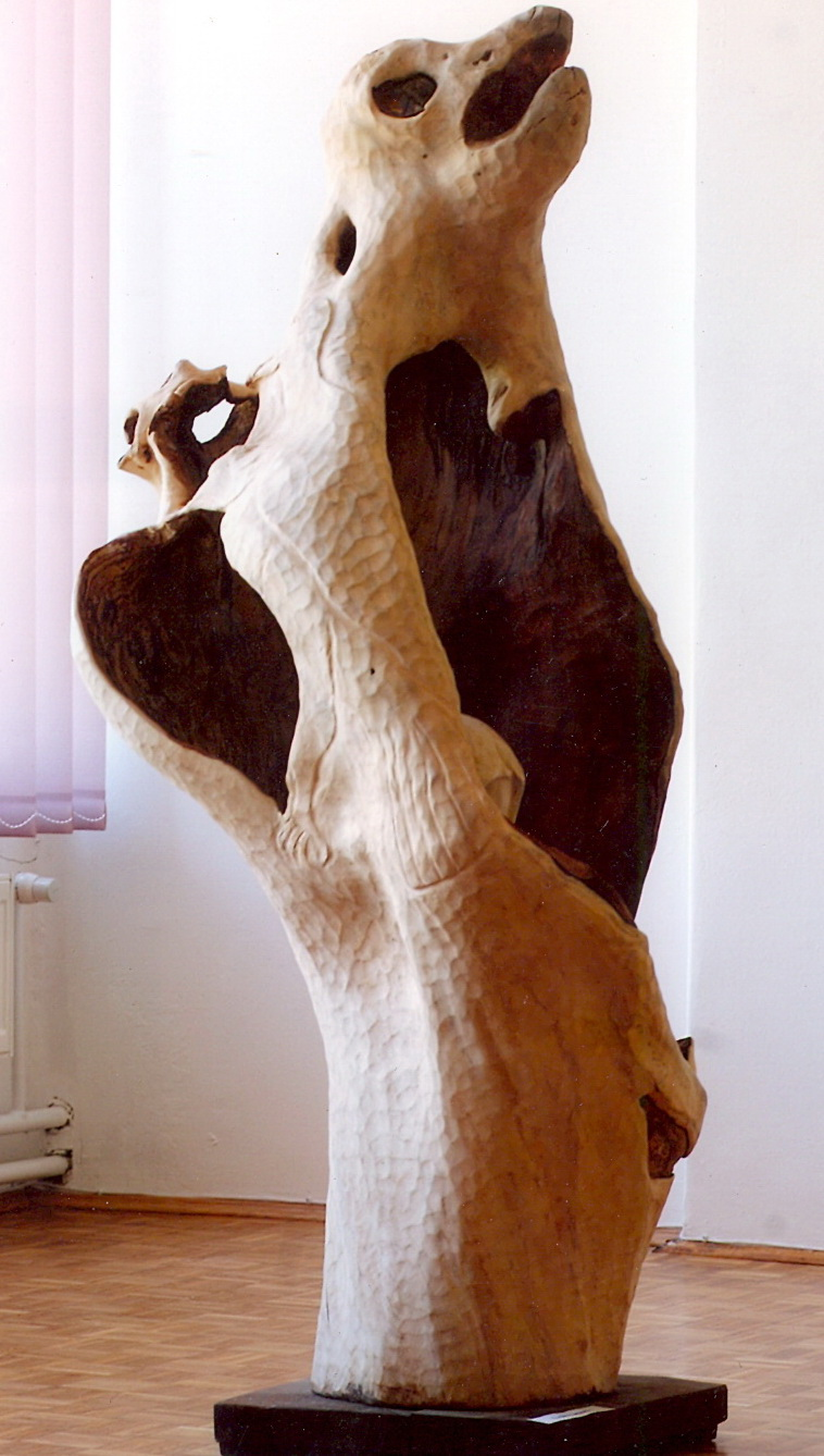 Holzskulptur